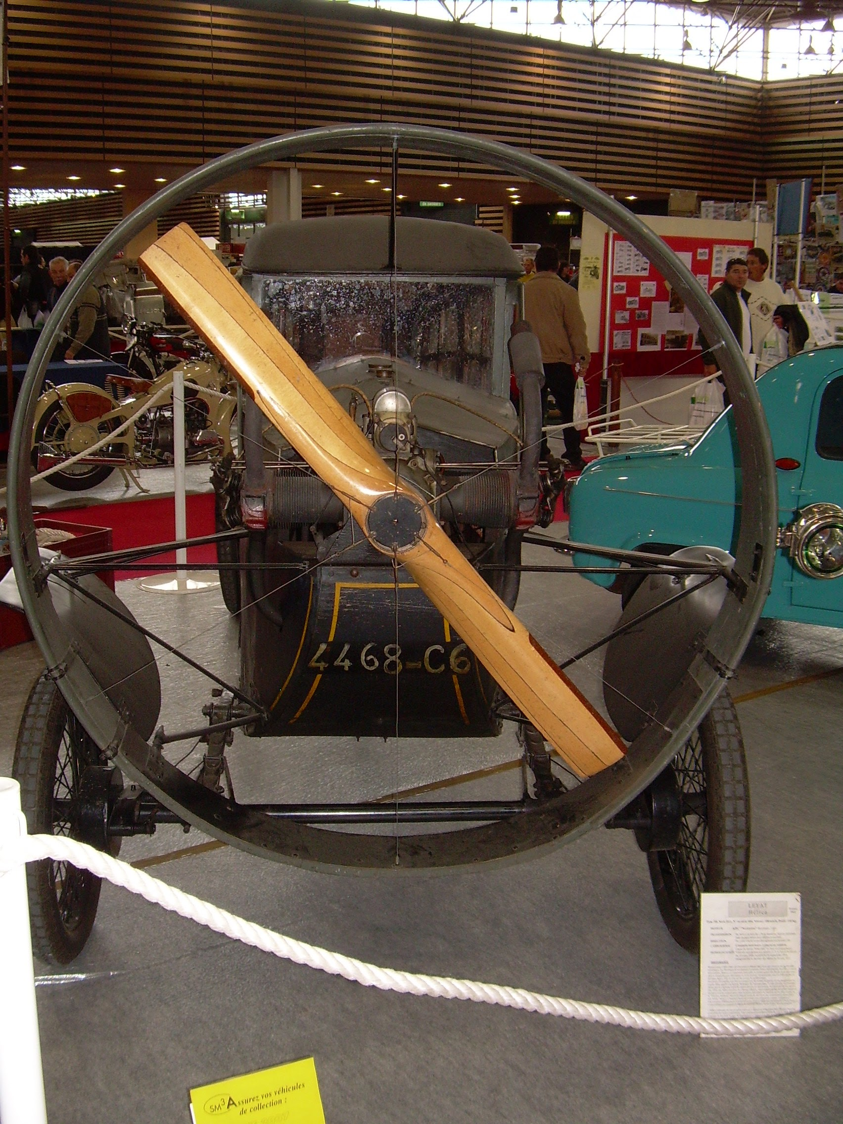 Epoqu'auto 2007